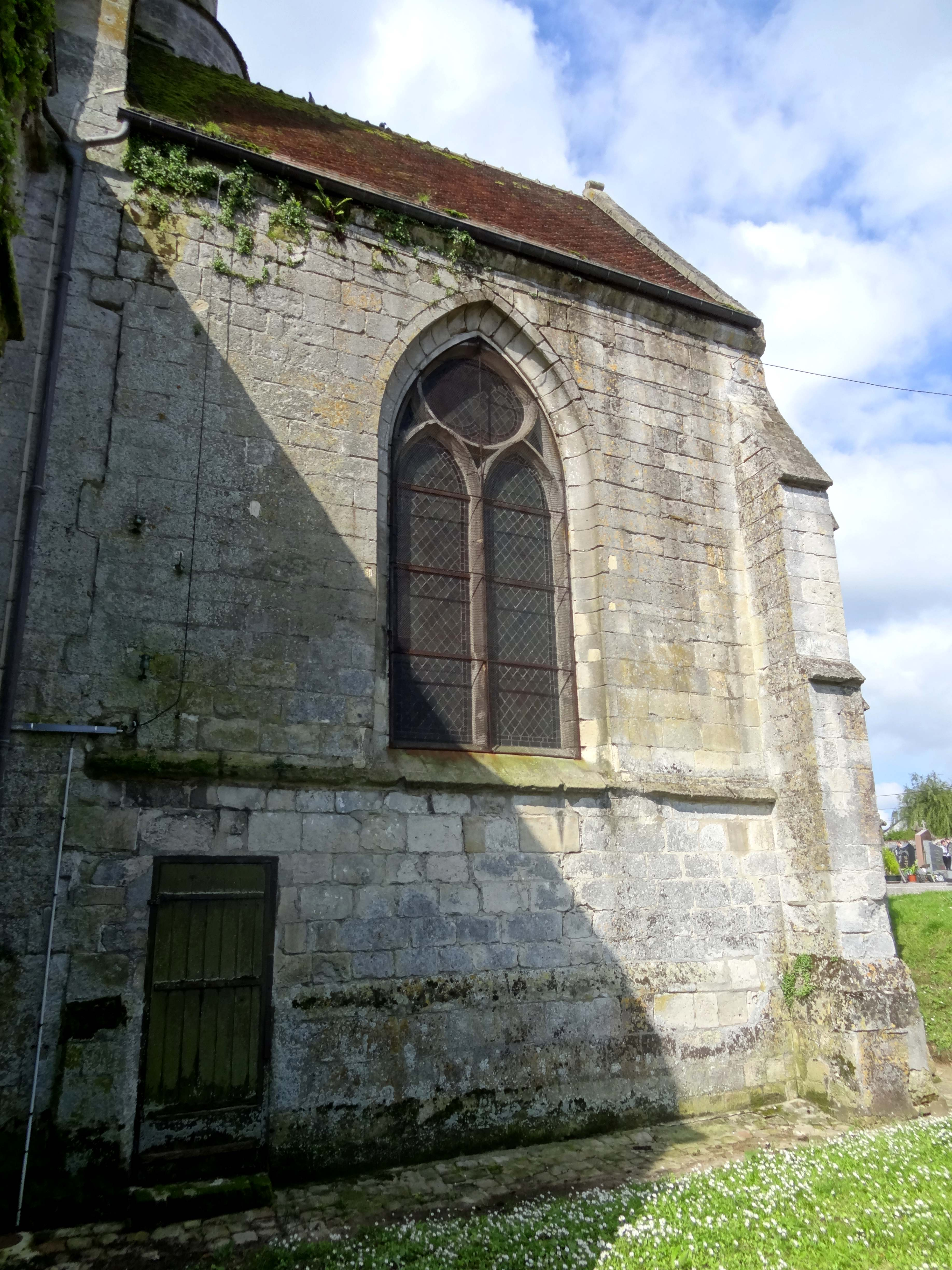 Église Saint-Barthélemy de Villeneuve-sur-Verberie - voir titre.